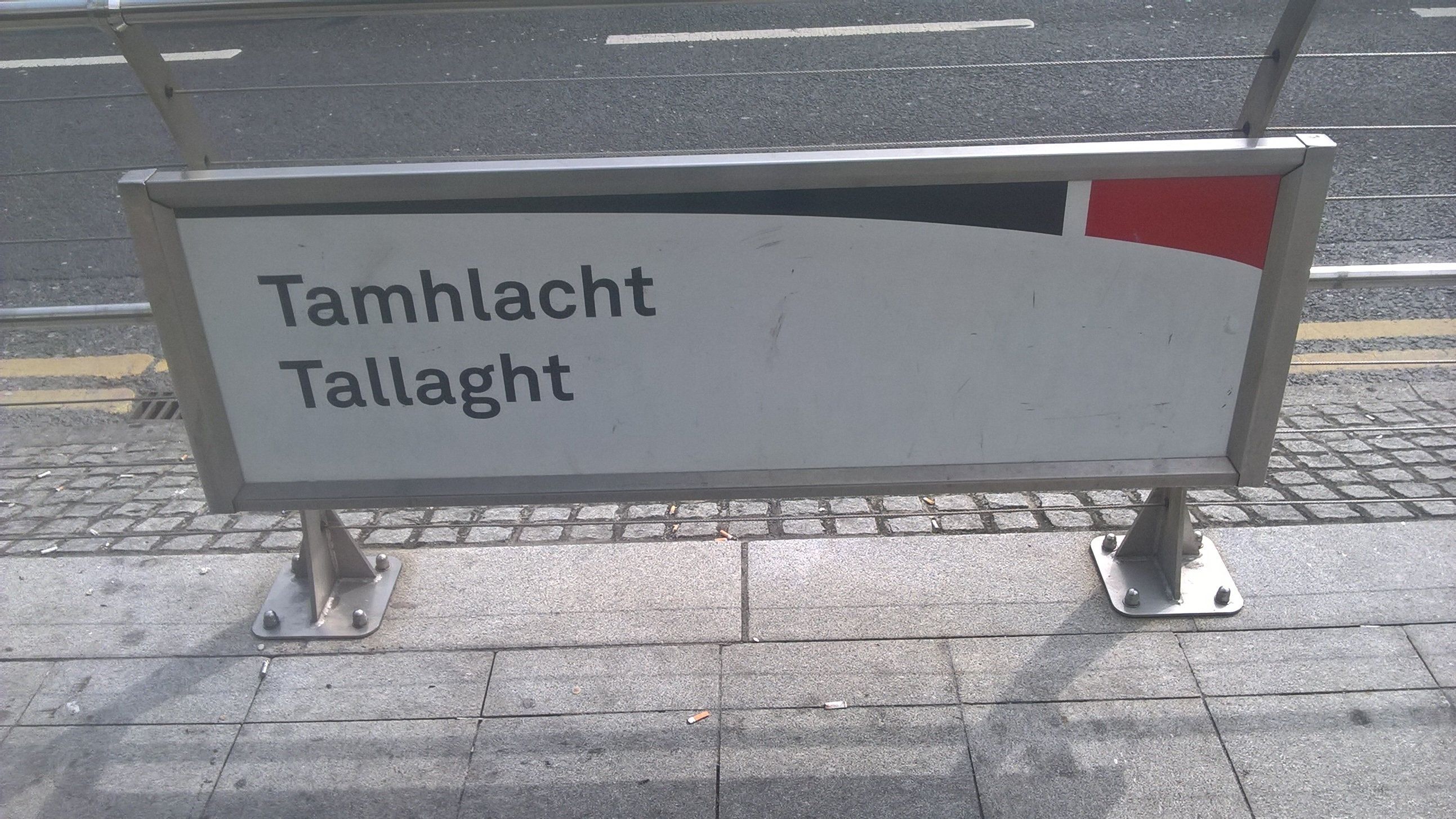 Comhartha dhátheangach ag staid Luas Tamhlachta (2019).